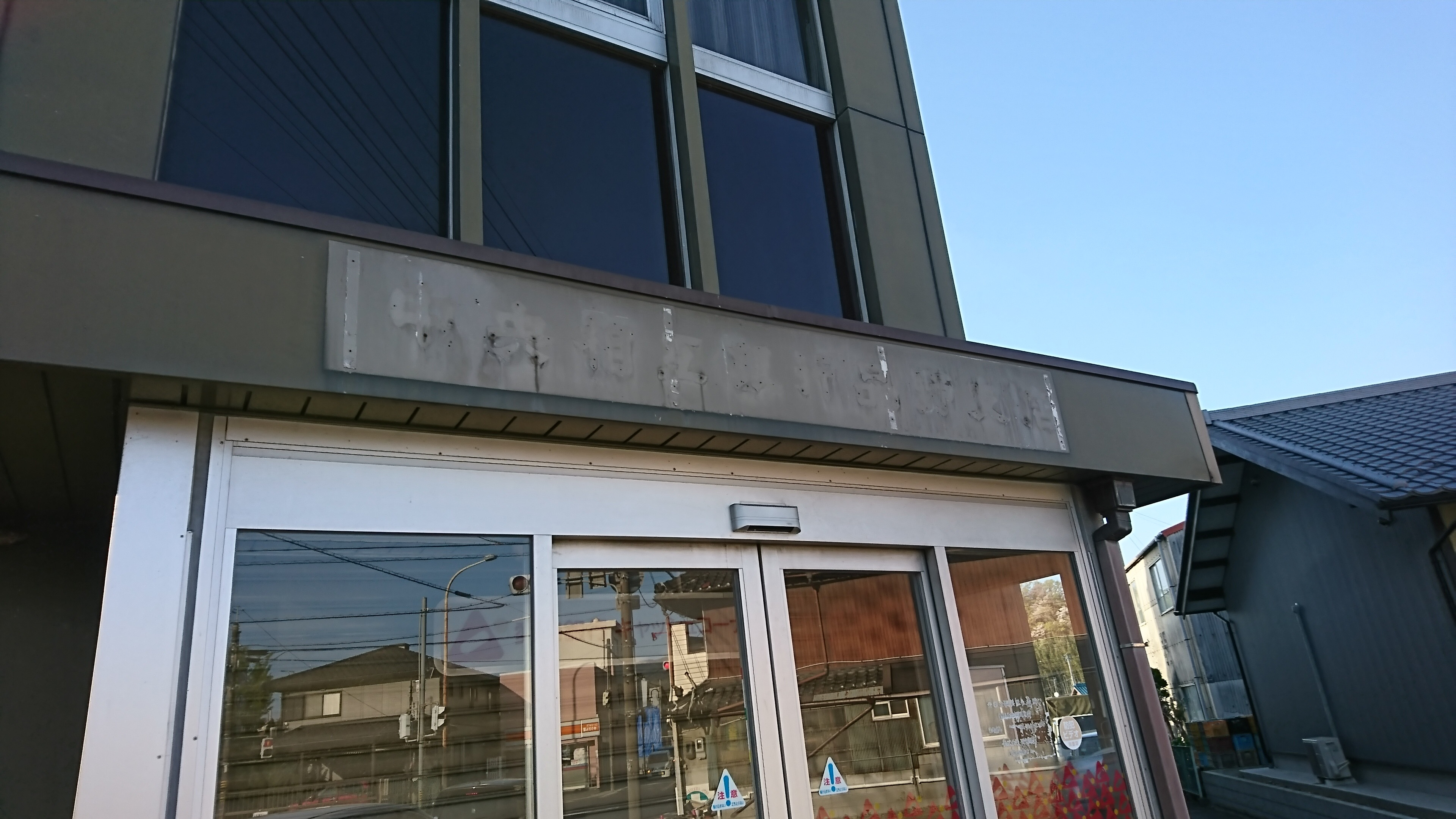 廃止された愛知銀行品野支店の建物。前身の「中央相互銀行」の文字がうっすら残る。